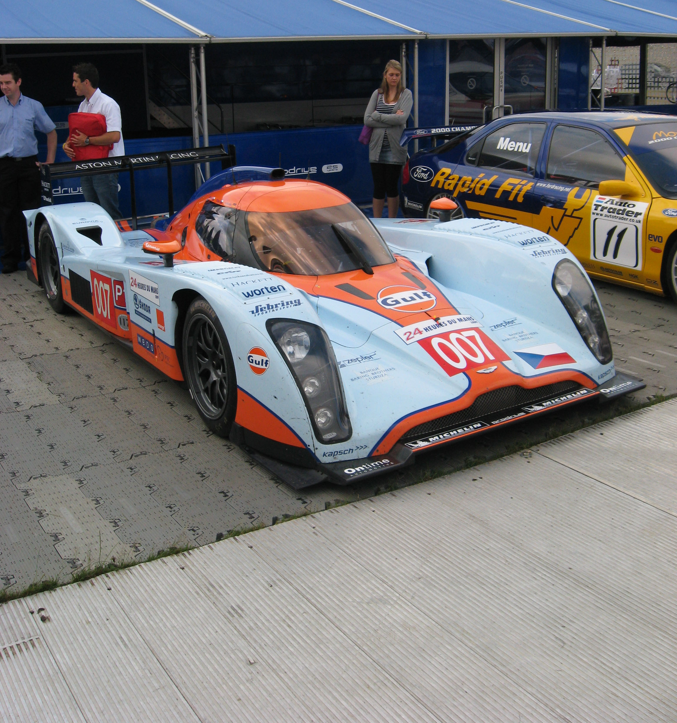 Lola-Aston Martin B09/60 LMP1 car